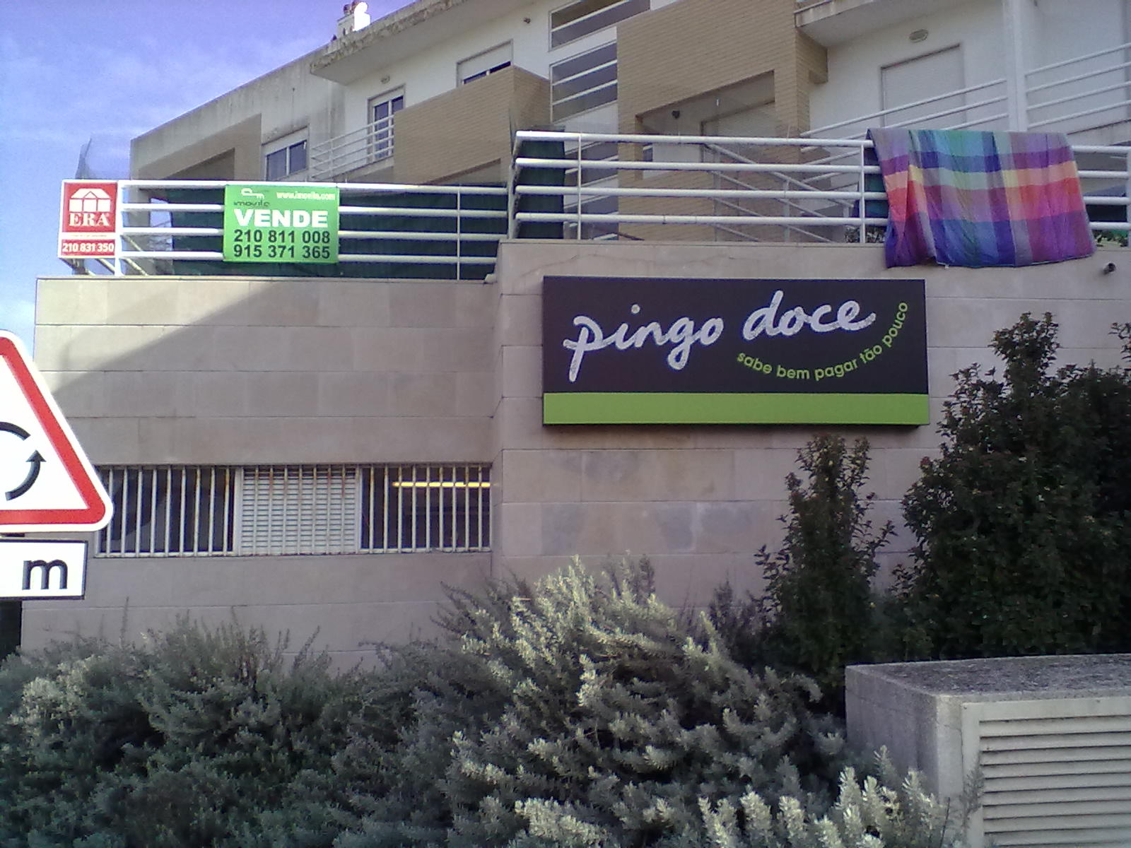 Pingo Doce de Santana em Sesimbra